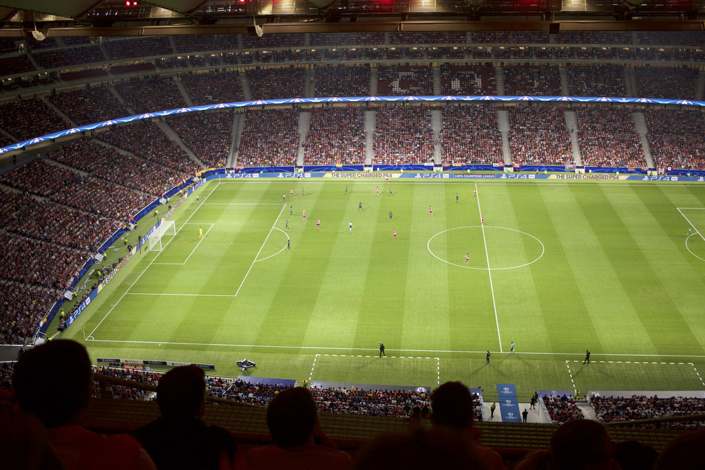 Estadio Metropolitano en el partido Atlético de Madrid-Chelsea.